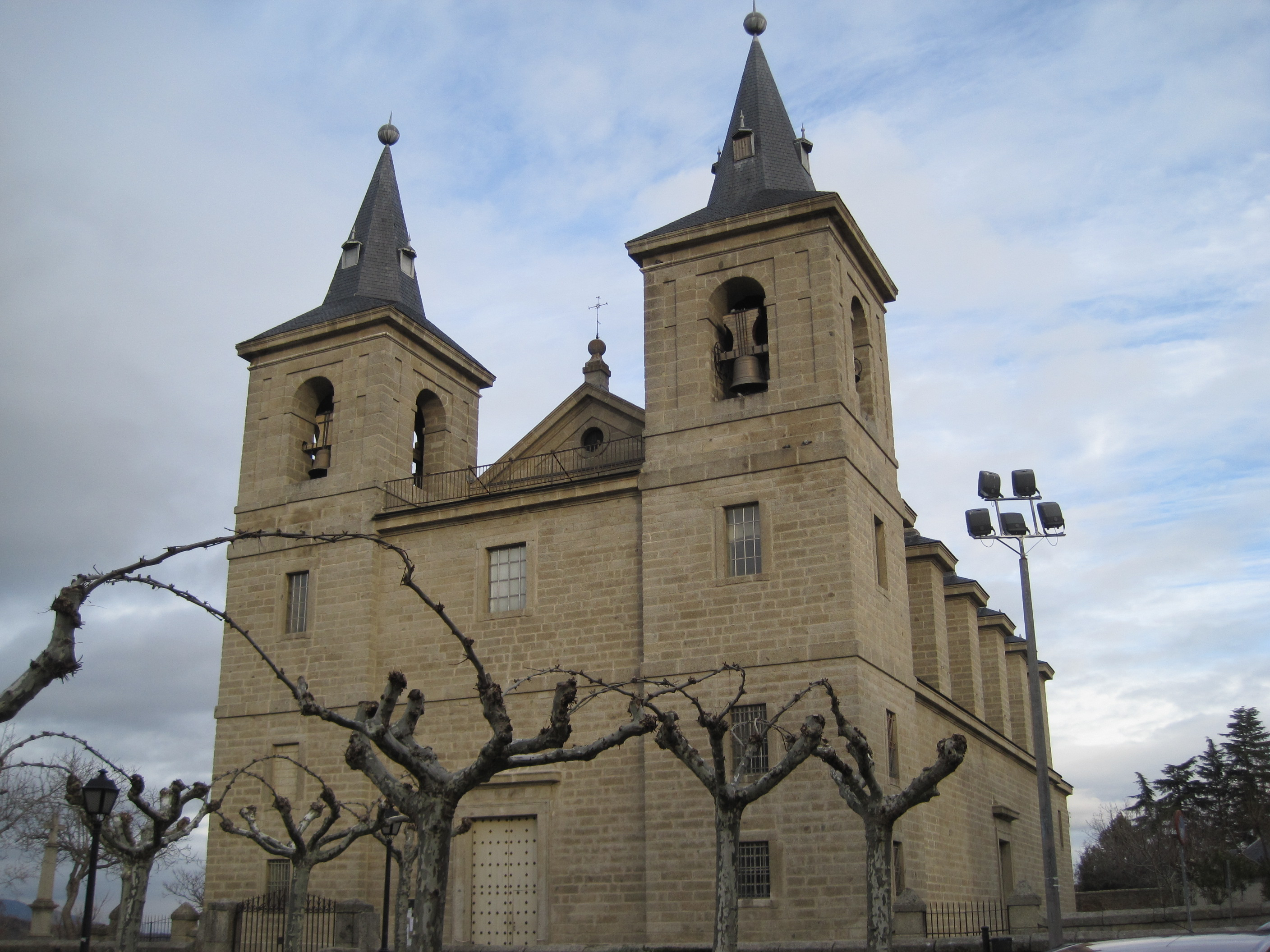 Iglesia de San Bernabé, en El Escorial (Madrid, España).